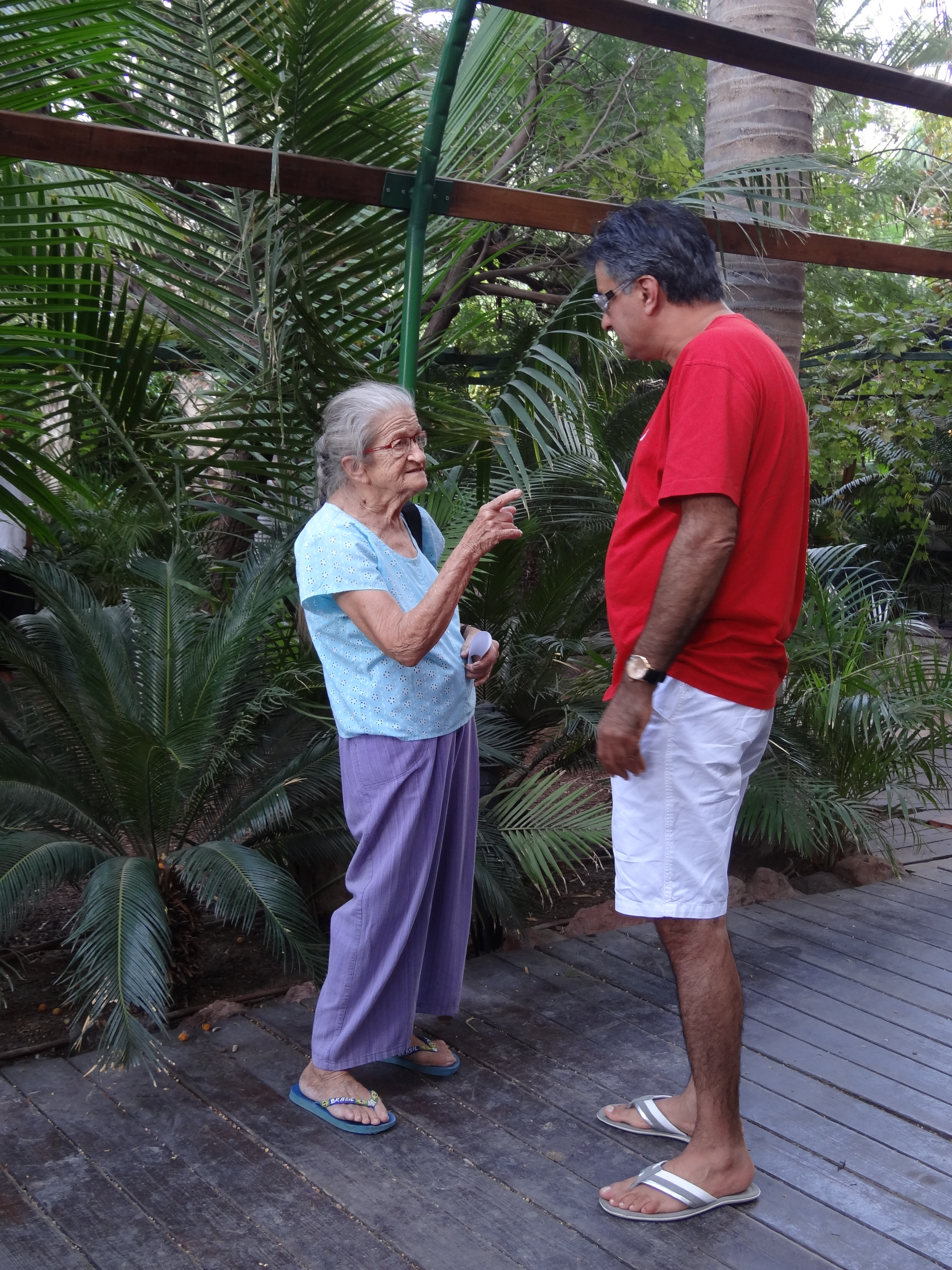 Naomi Polani & Moshe Lahav in front of "Tsel Tamar" resturant in Jordan Valley near Ashdot Ya'akov Ihud, Israel משה להב ונעמי פולני במפגש בכניסה למסעדת צל תמר בכניסה לקיבוץ אשדות יעקב איחוד. נעמי פולני (נולדה באב תרפ"ז 1927), זמרת, במאית ומעבדת ישראלית, מזוהה בעיקר עם ראשית דרכן של הלהקות הצבאיות ועם להקת "התרנגולים" אותה הקימה. משה להב הוא זמר ישראלי. המקיים את המופע משה להב הטיש הגדול משה להב מימין ונעמי פולני משמאל